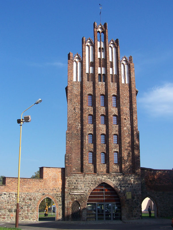 Goleniów, Brama Wolińska, ob. dom kultury, XIV, XV